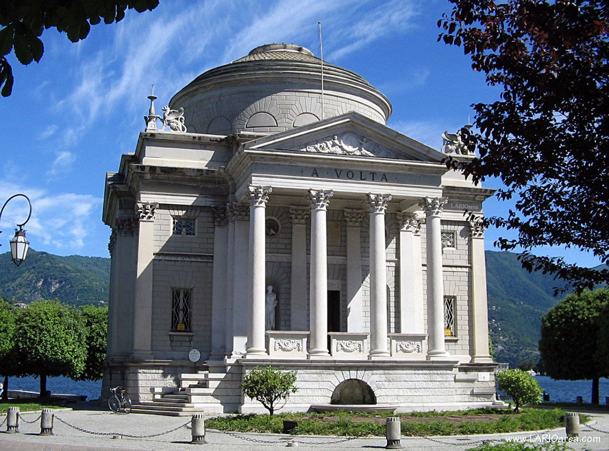 Tempio Voltiano è un museo scientifico in Como, Italia. Progetto dell'architetto Federico Frigerio.